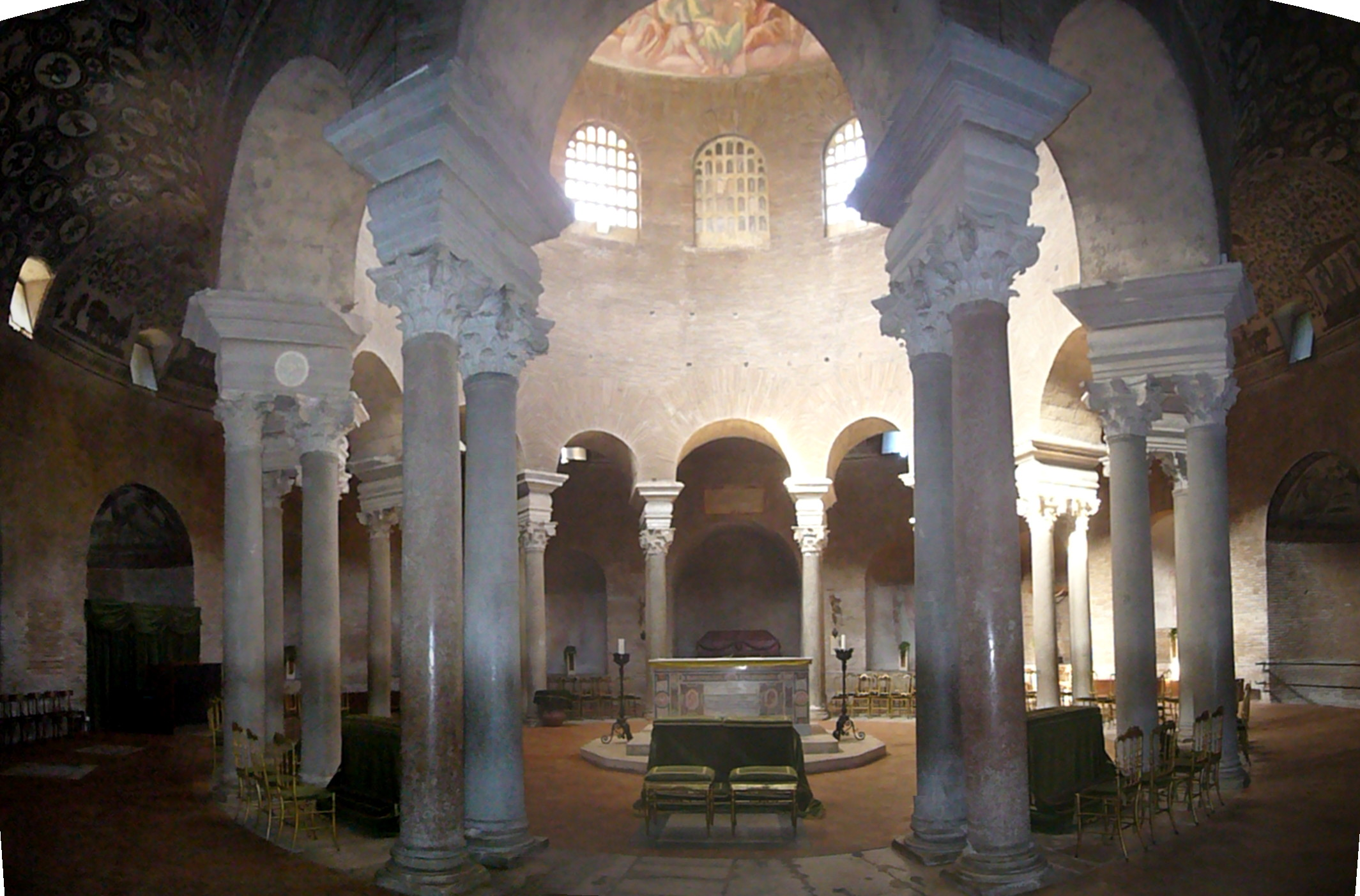 Roma, santa Costanza - interno